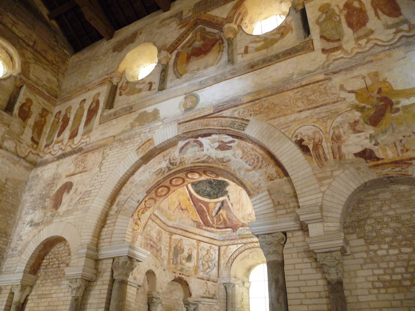 Intérieur du Baptistère Saint Jean à Poitiers, France. Au-dessus de la grande arcade centrale, un triplet constitué de deux arcs clavés en plein-cintre encadrant un arc en mitre. Les fresques murales datent du XIe au XIIIe siècle